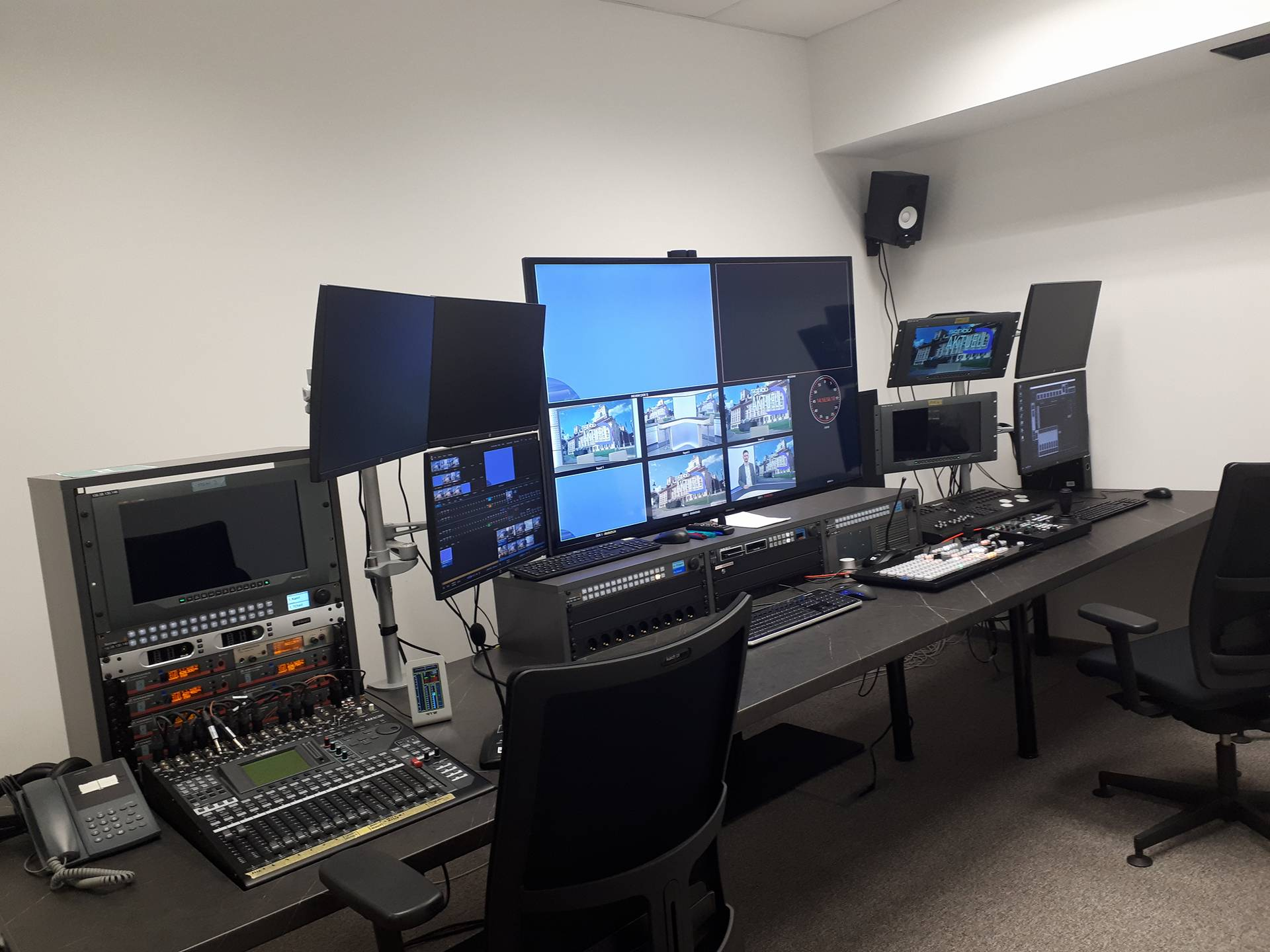 Studio Wien, SchauTV, Regie I